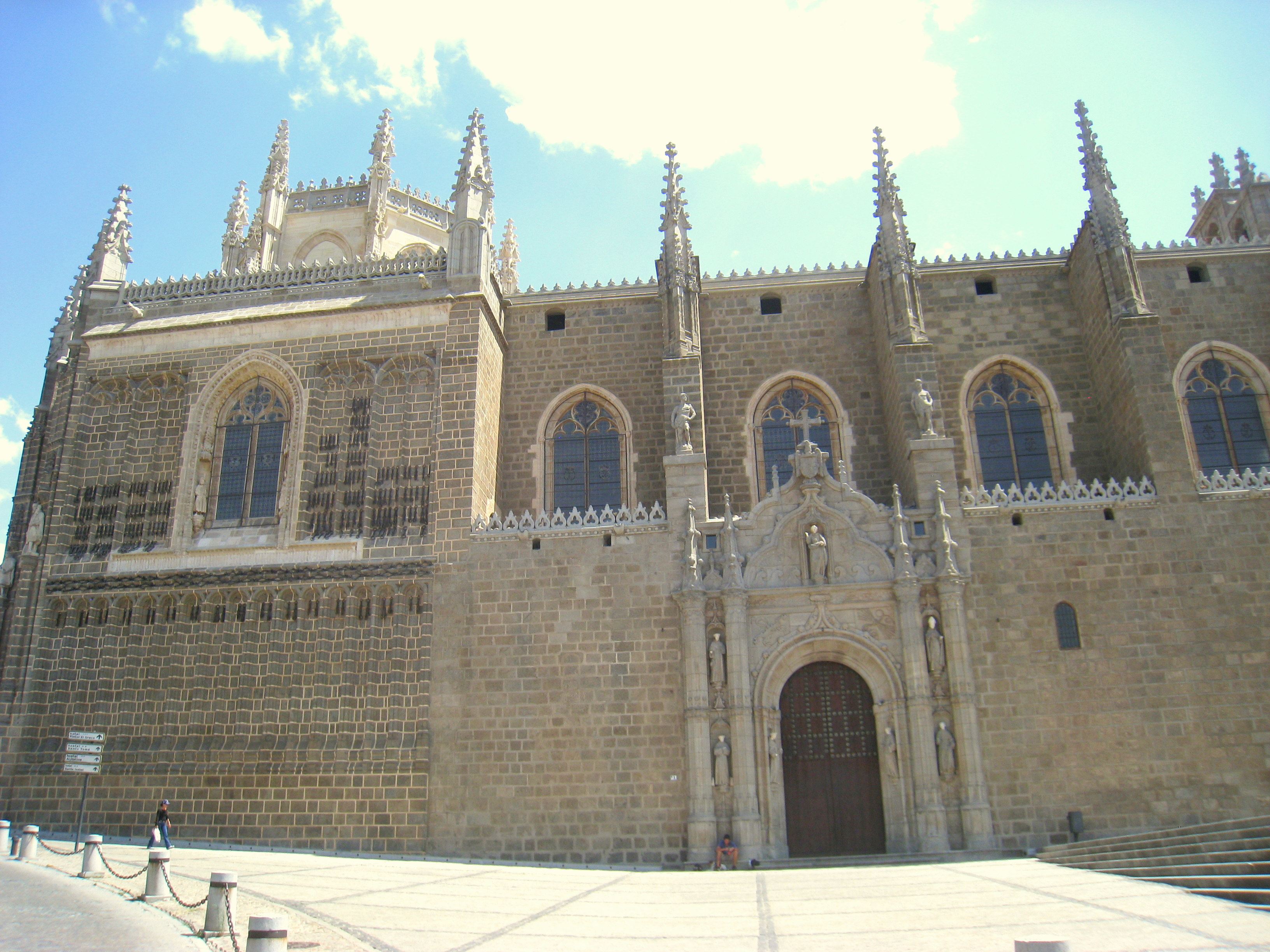 San Juan de los Reyes - Toledo, Spain.